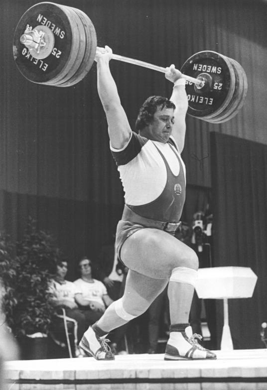 Jürgen Heuser ADN-ZB Mittelstädt 21.12.1980 Bez. Frankfurt-O.: 32.DDR-Gewichthebermeisterschaft-Bei den 32. DDR-Gewichthebermeisterschaften in Eberswalde-Finow wurde der Silbermedeillengewinner bei den Olympischen Spielen von Moskau Jürgen Heuser von Motor Stralsund im Superschwergewicht mit 400 (175-225) seiner Favoritenrolle gerecht.